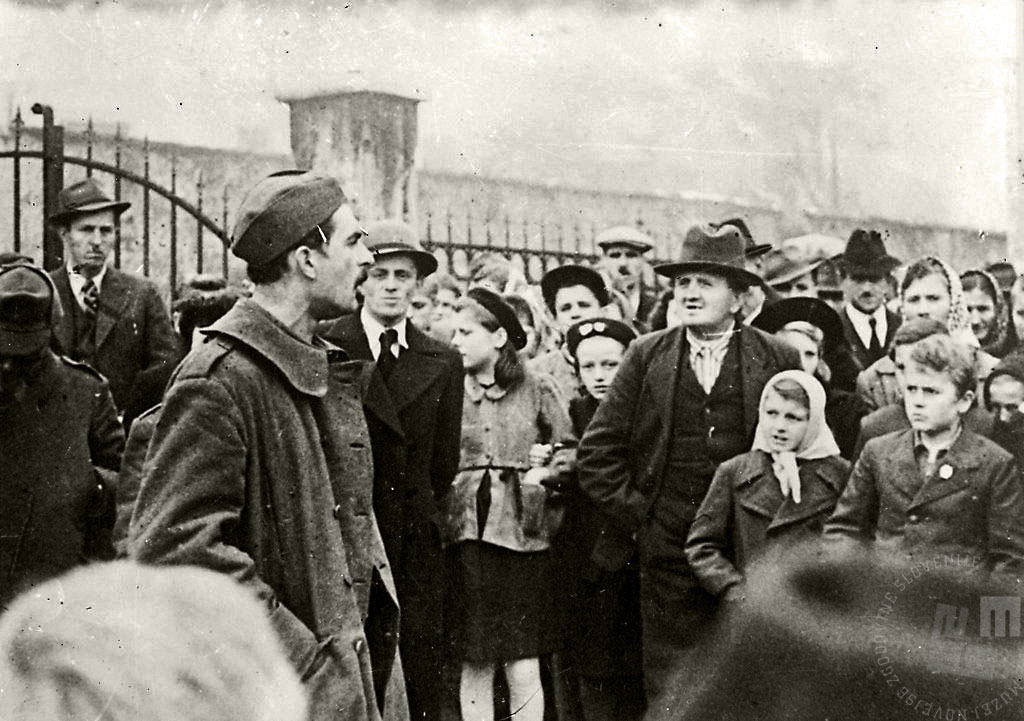 Kajuh govori na mitingu v Starem trgu pri Ložu.